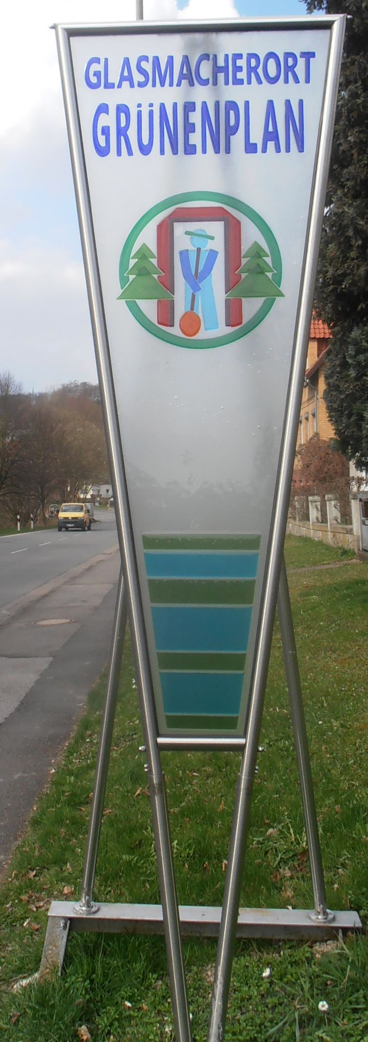 Schild am Ortseingang Delligsen-Grünenplan